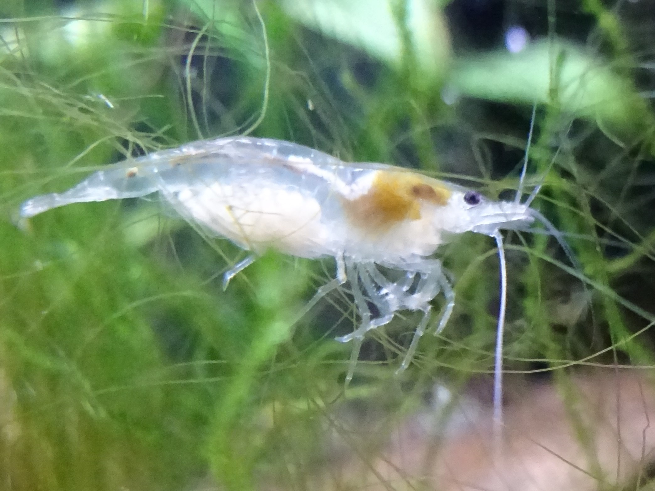 parallele Eireifung unbefruchteter und befruchteter Eier bei Neocaridina palmata